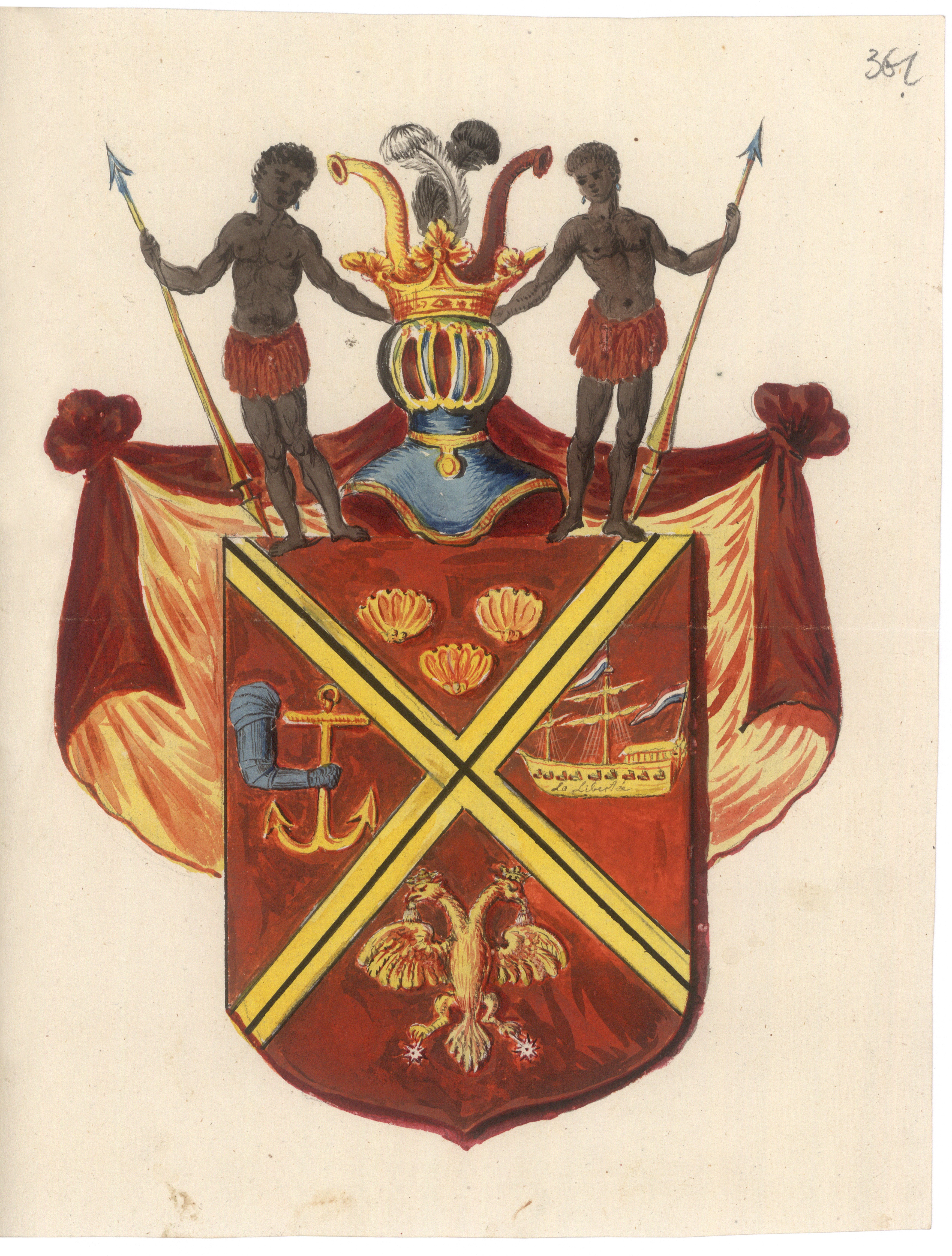 Freiherren-Diplom J.A. Freiherr von Quast 1790